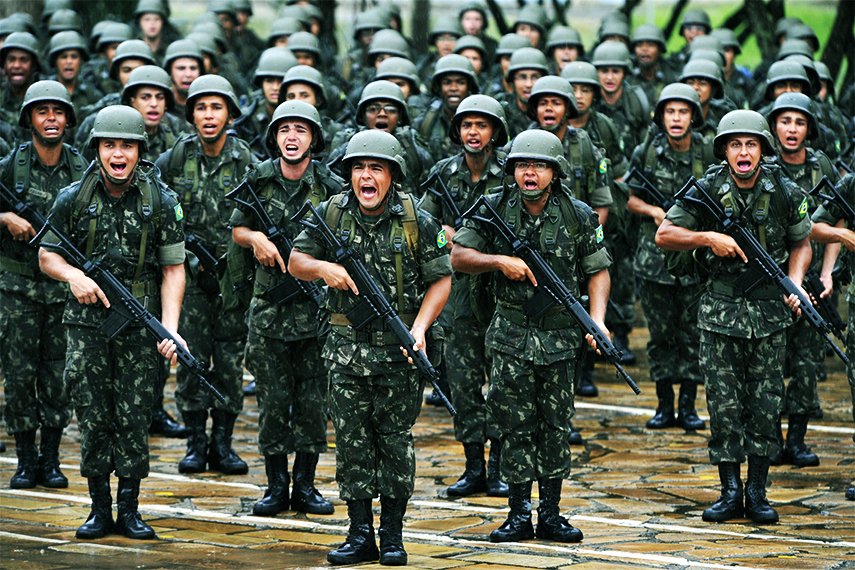 Foto: Exército Brasileiro